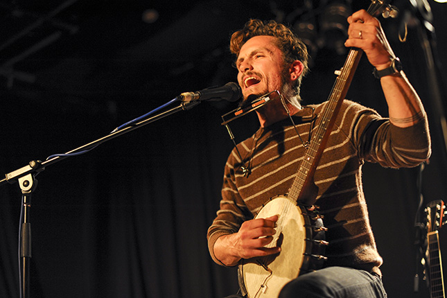 WAMi Festival 2012